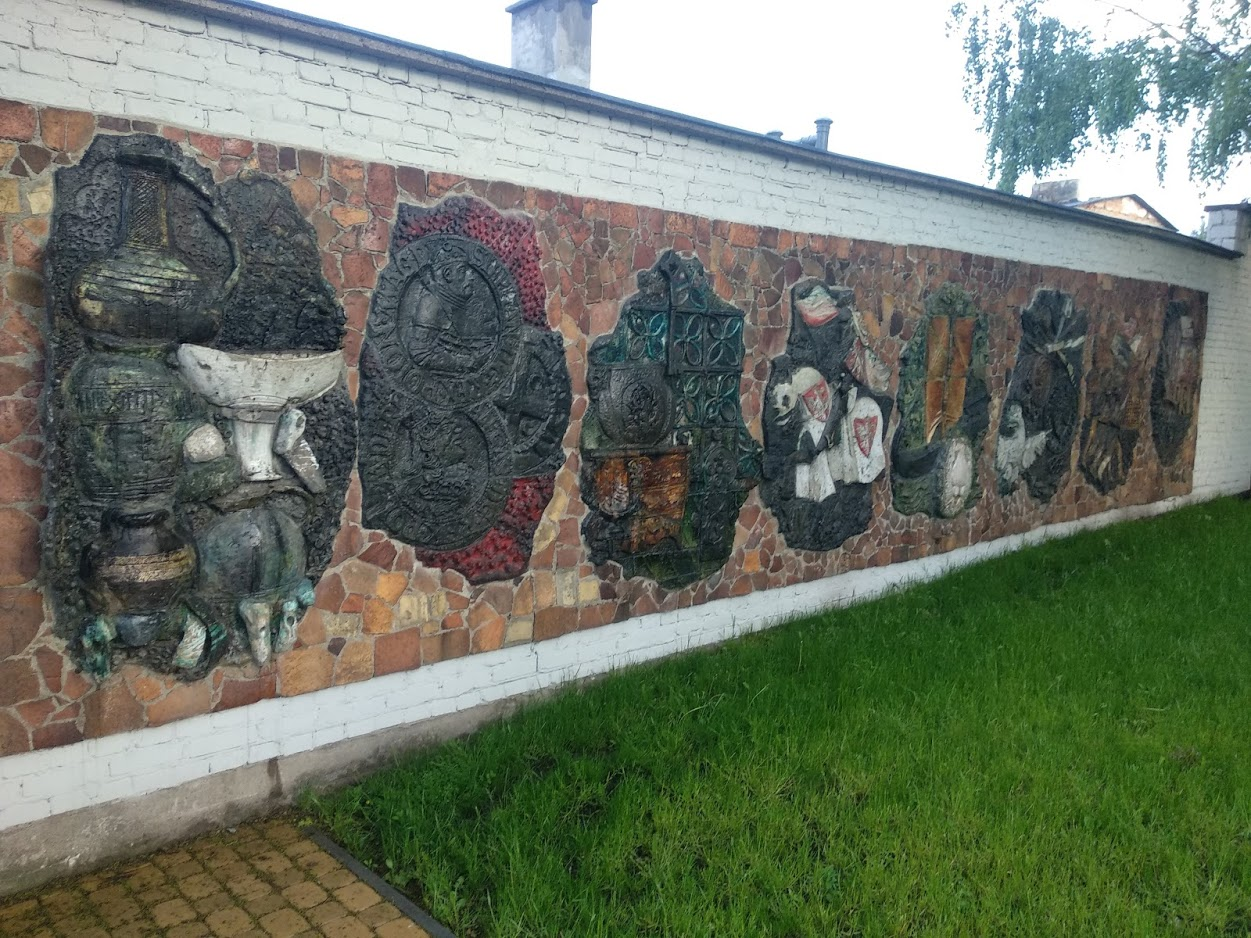 Muzeum Historii Włocławka (2019 r.)